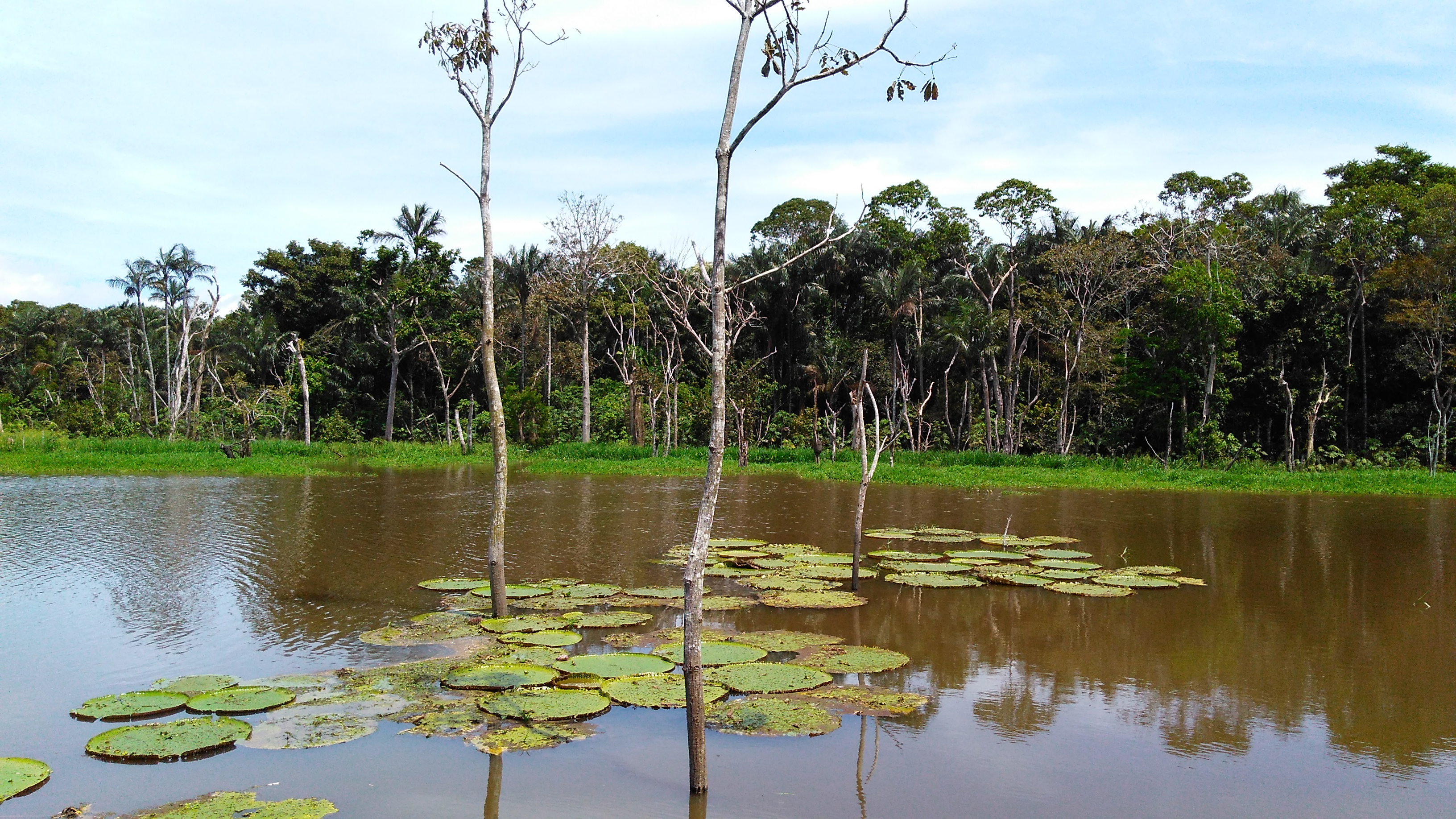 Floresta flutuante no Rio Negro com destaque para vitórias-régias